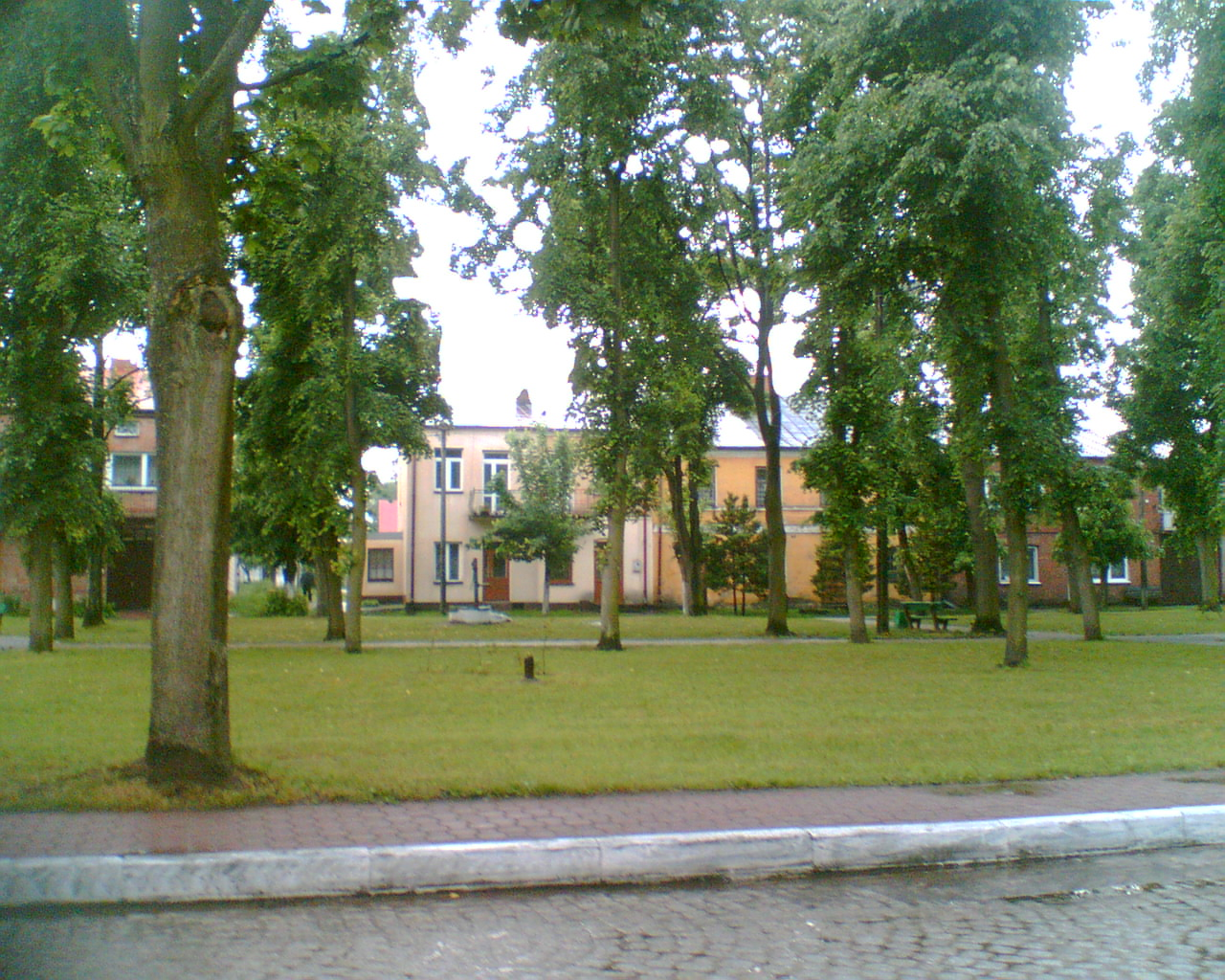 Skwer w centrum Radoszyc